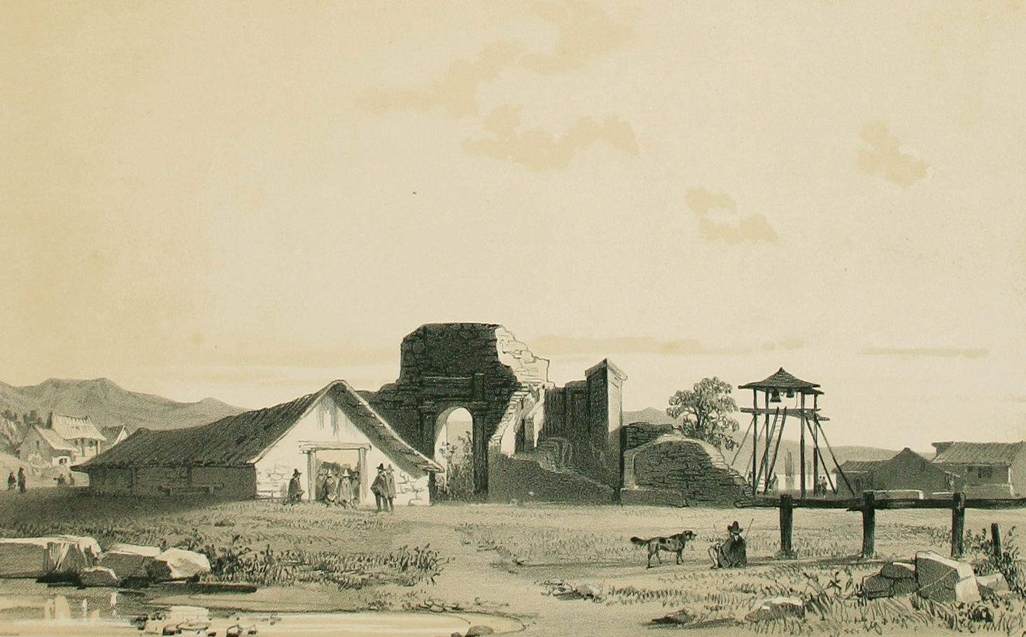 Église de Penco (en 1838). Atlas pittoresque, planche 31 Iglesia de Penco, Chile, en 1838.